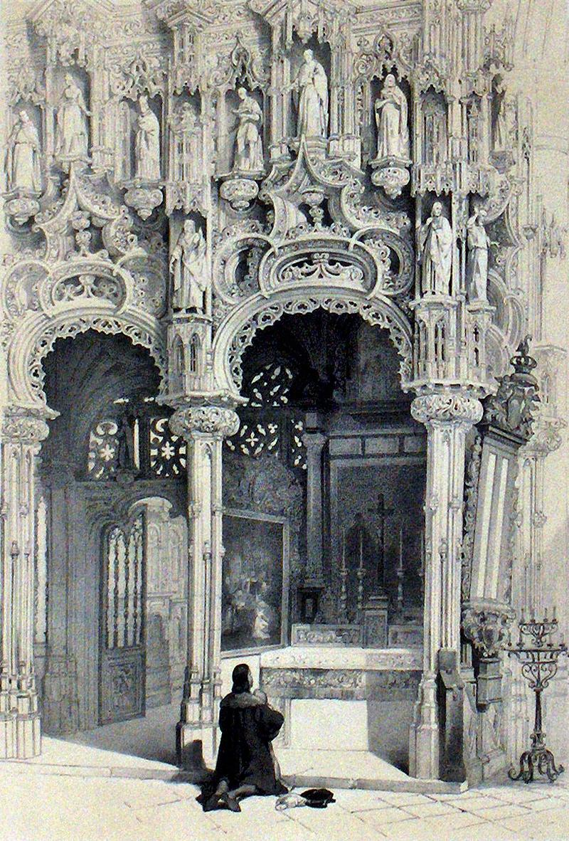 "Doksaal van de Sint-Niklaaskerk, Diksmuide" (verwoest in de Eerste Wereldoorlog), oude gravure (19de eeuw); privé bezit